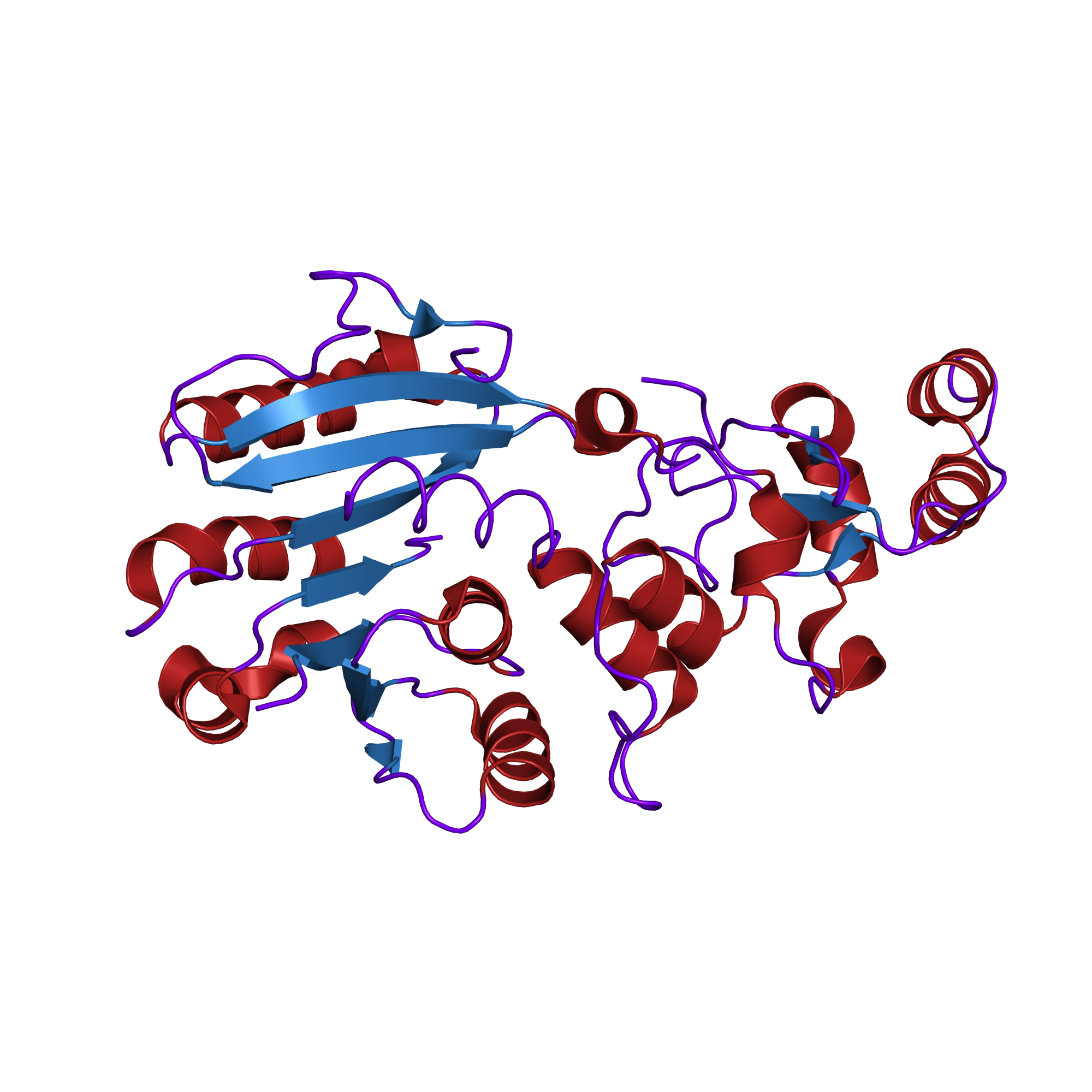 3D structure of protein deposited with PDB code 1g55.